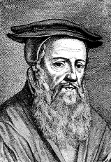 gemeinfrei